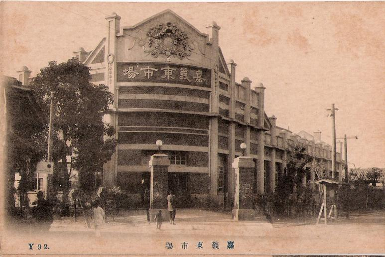 中文（台灣）: 嘉義東市場。